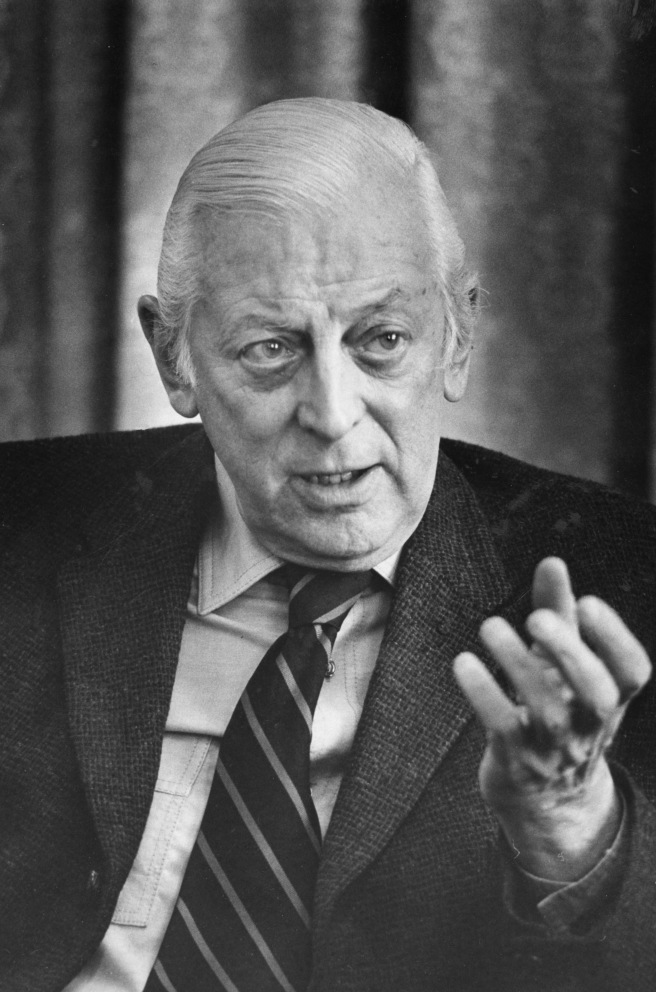 Alistair Cooke being interviewed.